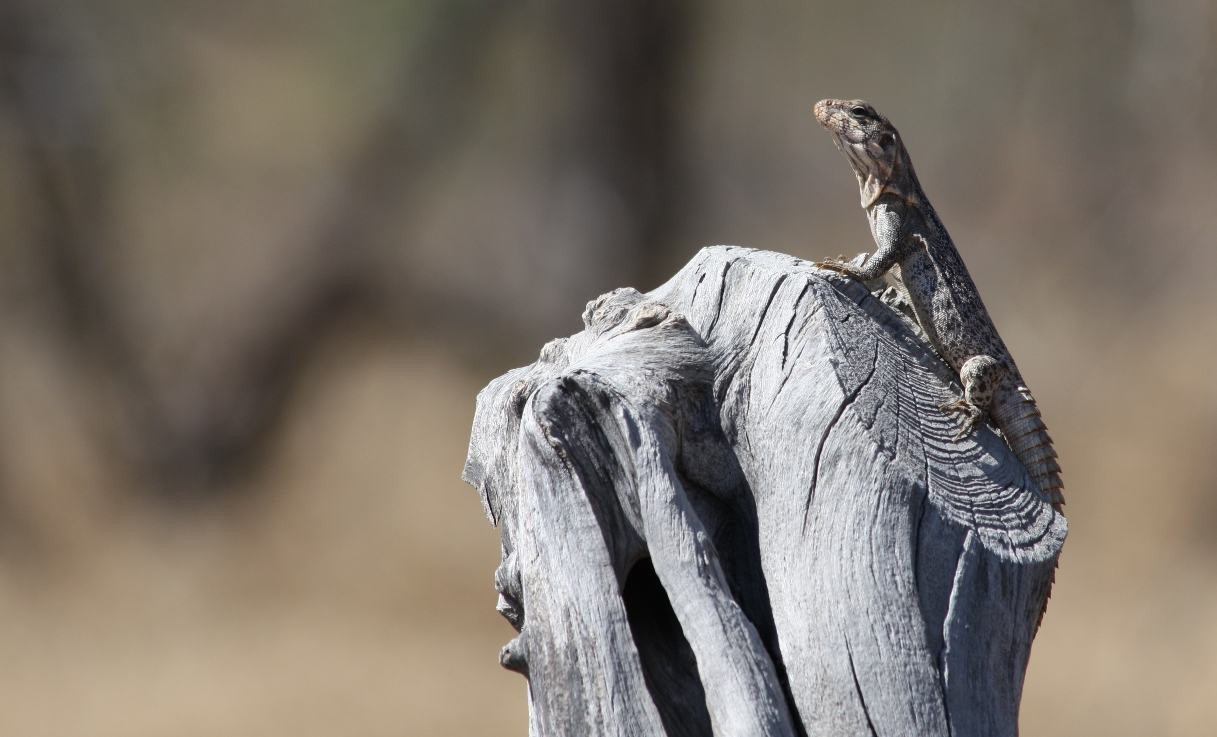 Un ejemplar de la fauna de la Depresión del Balsas en la Reserva de la Biosfera Zicuirán Infiernillo. México.